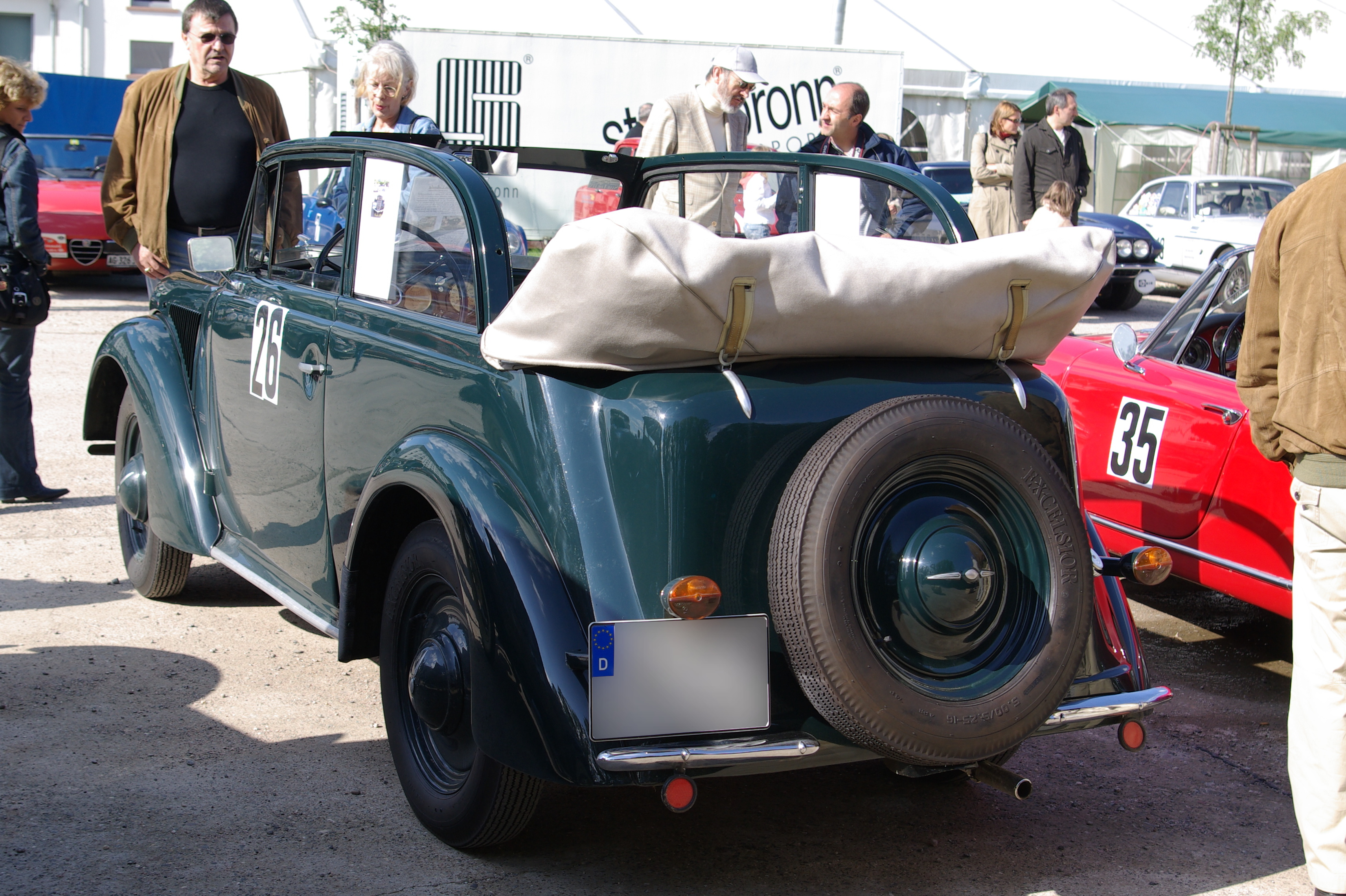 Opel Olympia Baujahr 1936